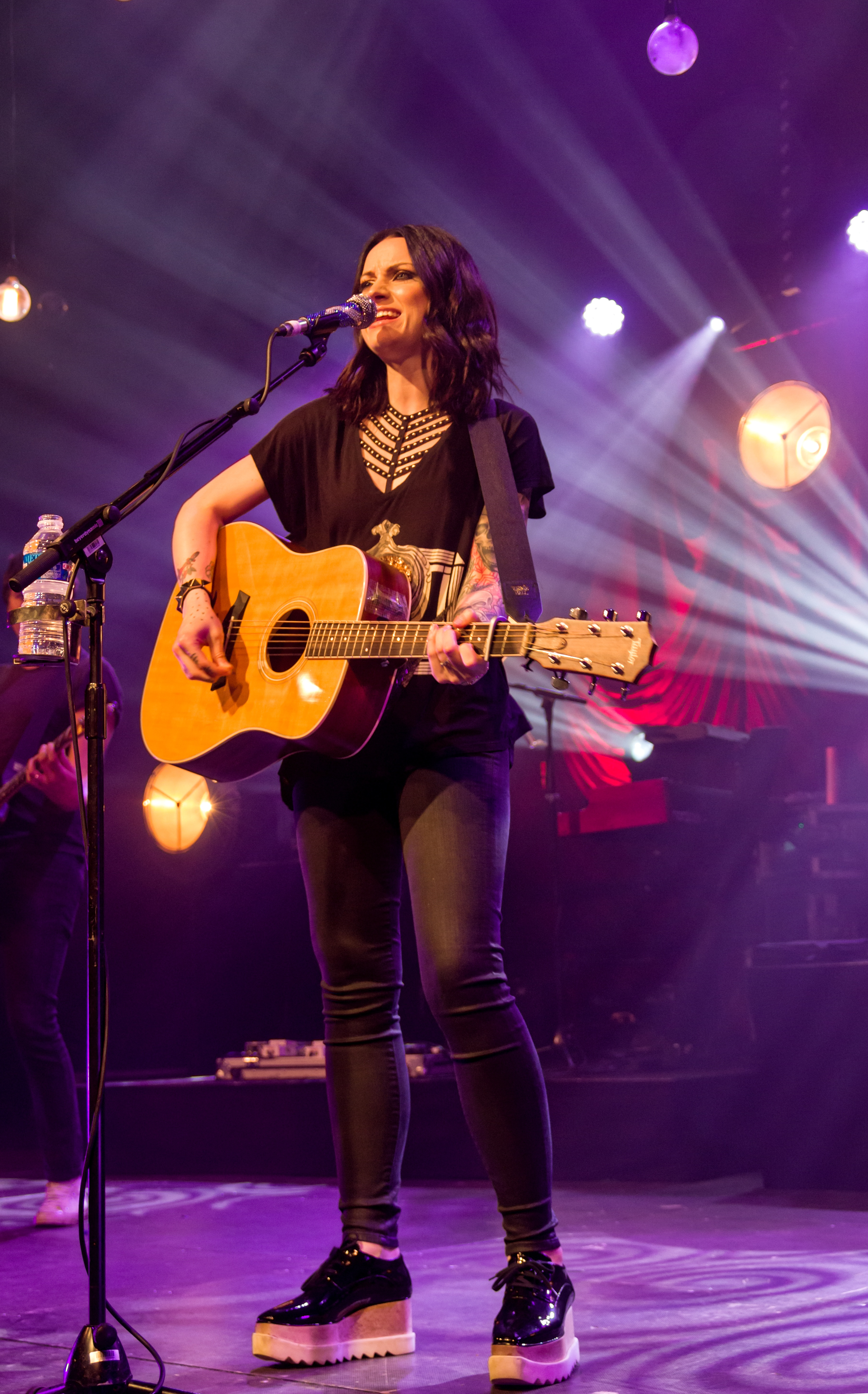 Bilder vom Zelt Musik Festival 2017 in Freiburg im Breisgau